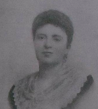 Immagine di Paolina Schiff tratto da "La luce del pensiero"